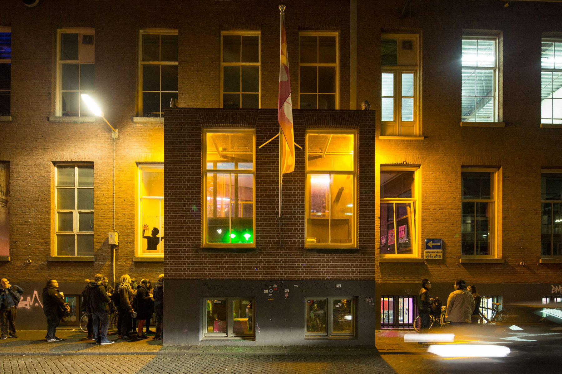 Foto pand WORM